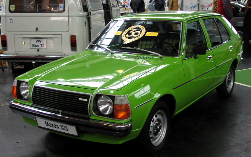 Mazda 323 (1st Series) (1977)